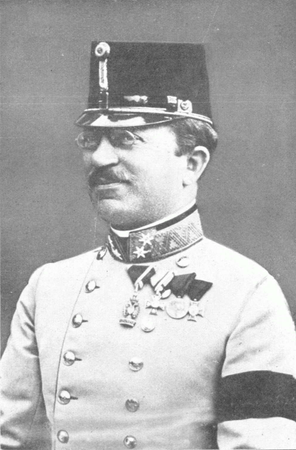 Arthur Freiherr Arz von Straußenburg (1857-1935), Austrian-Hungarian general